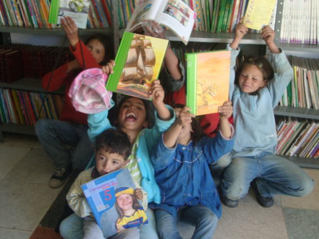 Estos son los niños que conforman los grupos de lectura de la biblioteca escolar sede Quiba.